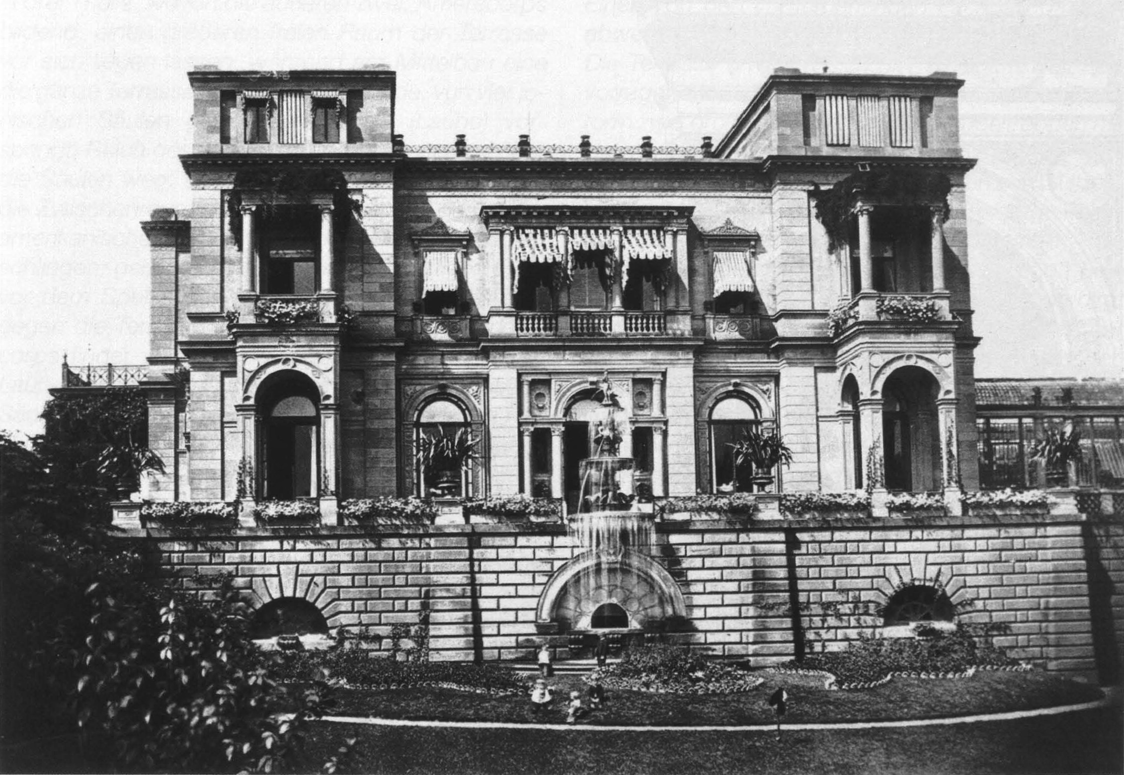 Stuttgart, Villa Berg, Ostfassade mit Nymphenbrunnen von Albert Güldenstein (1851), Foto